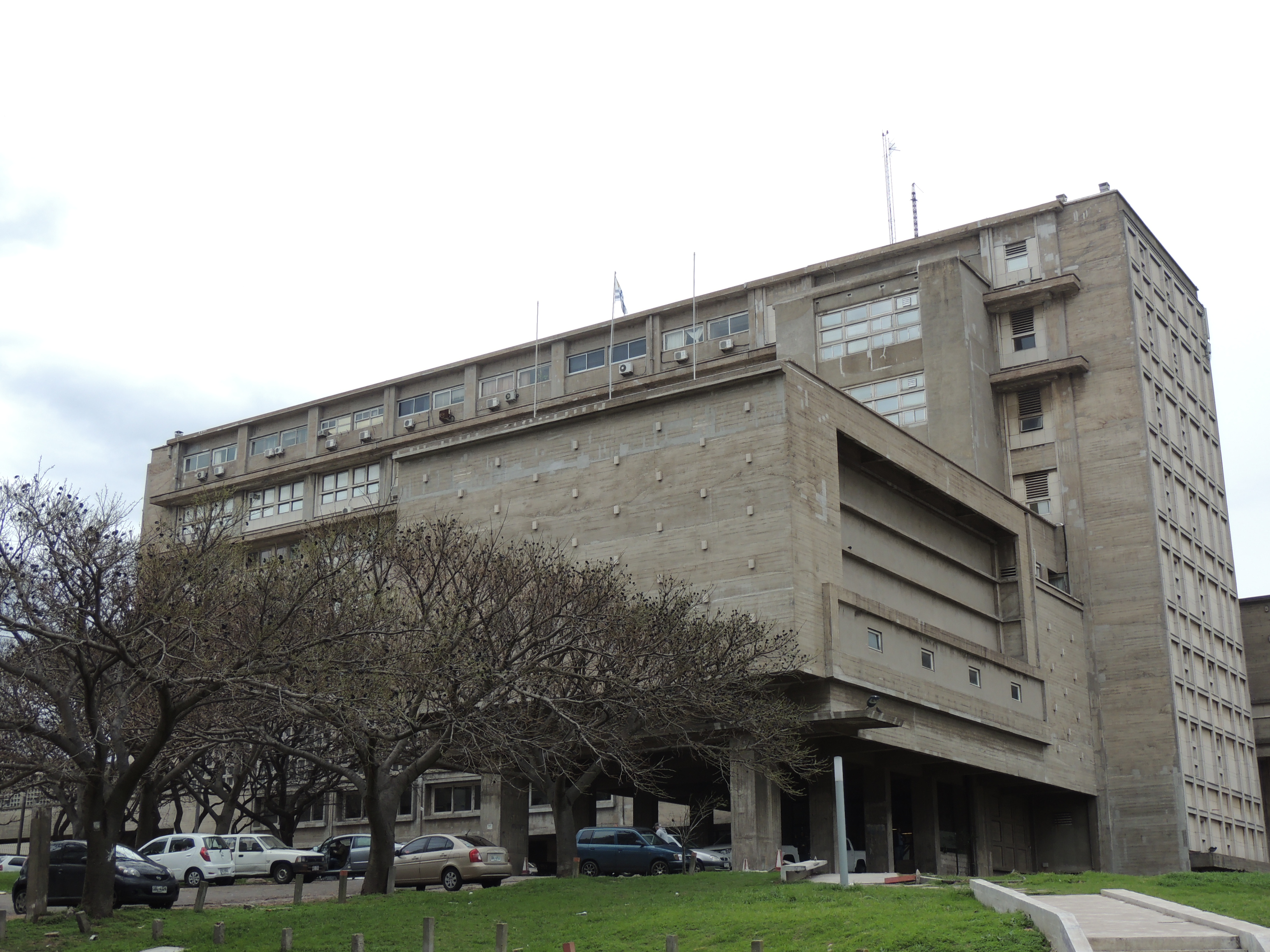 Facultad de Ingeniería. Ubicada en el departamento de Montevideo